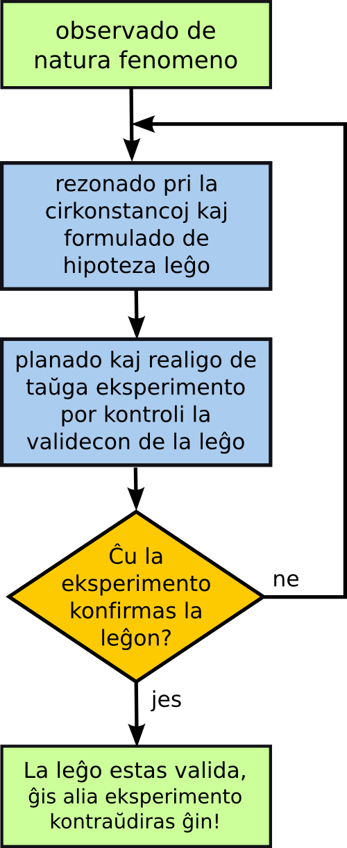 Fluskemo de naturscienca labormetodo